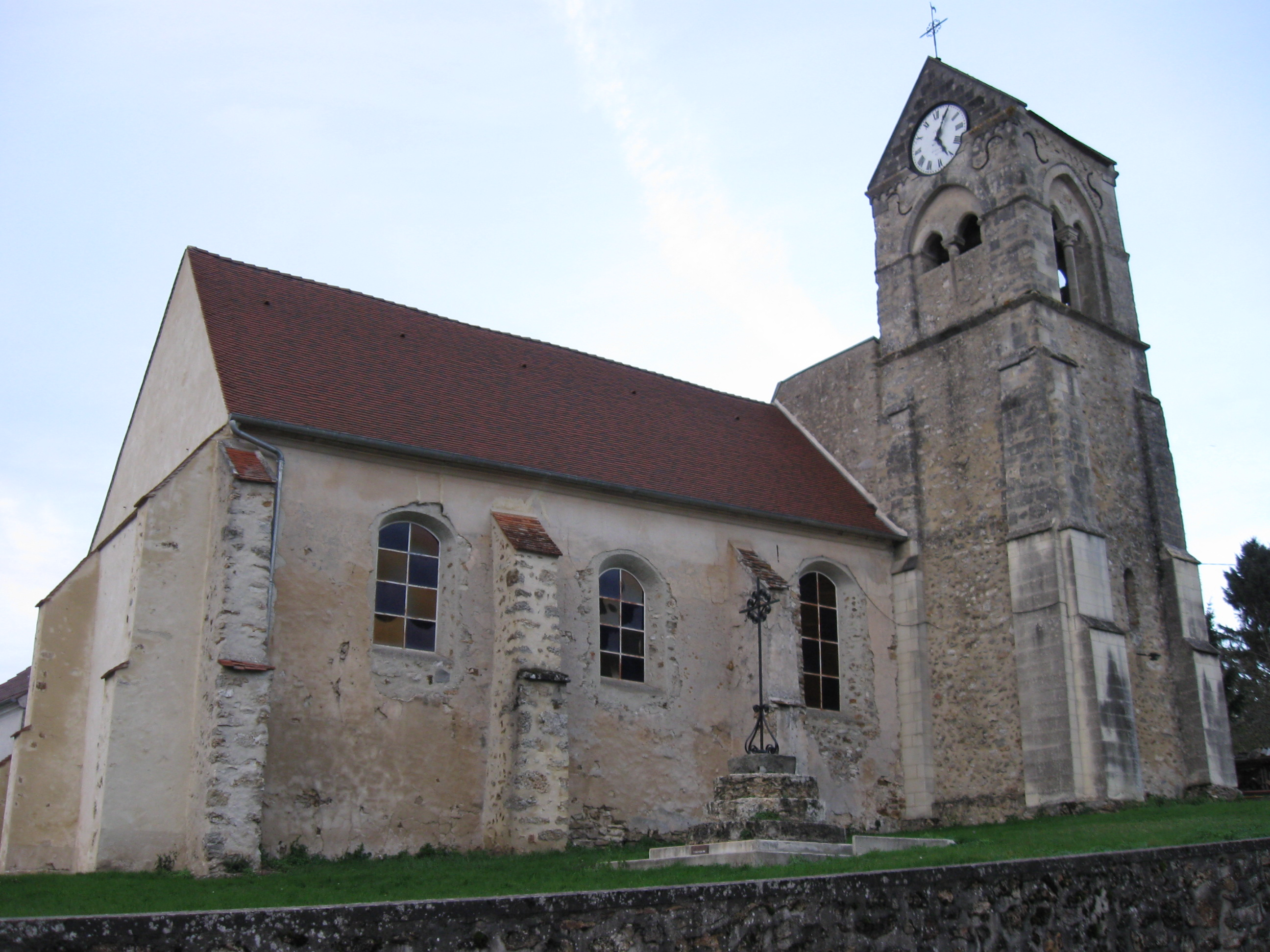 Église Saint-Quentin de Domptin. (département de l'Aisne , région Picardie).